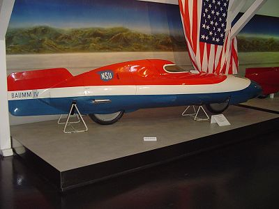 Baumm IV Weltrekord 218km/h Deutsches Zweirad- und NSU-Museum